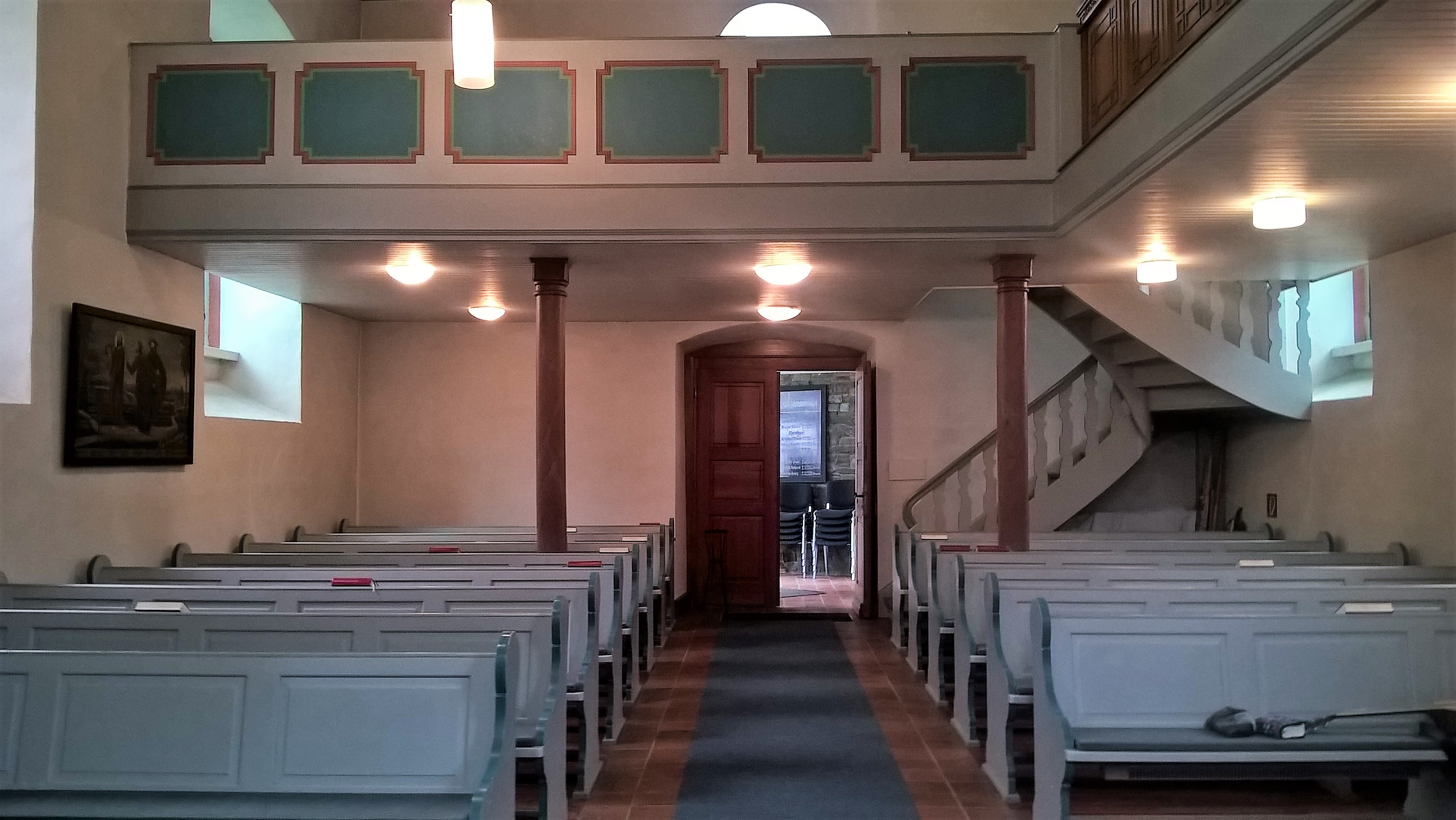 Evangelische Kirche Butzbach-Maibach, Wetteraukreis, Hessen, Deutschland